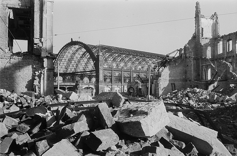 Original image description from the Deutsche FotothekBlick aus den Ruinen an der Jahnstraße zur Ruine der Bahnsteighalle des Bahnhofes Dresden Wettinerstraße (1946 Umbenennung in Bahnhof Dresden Mitte)